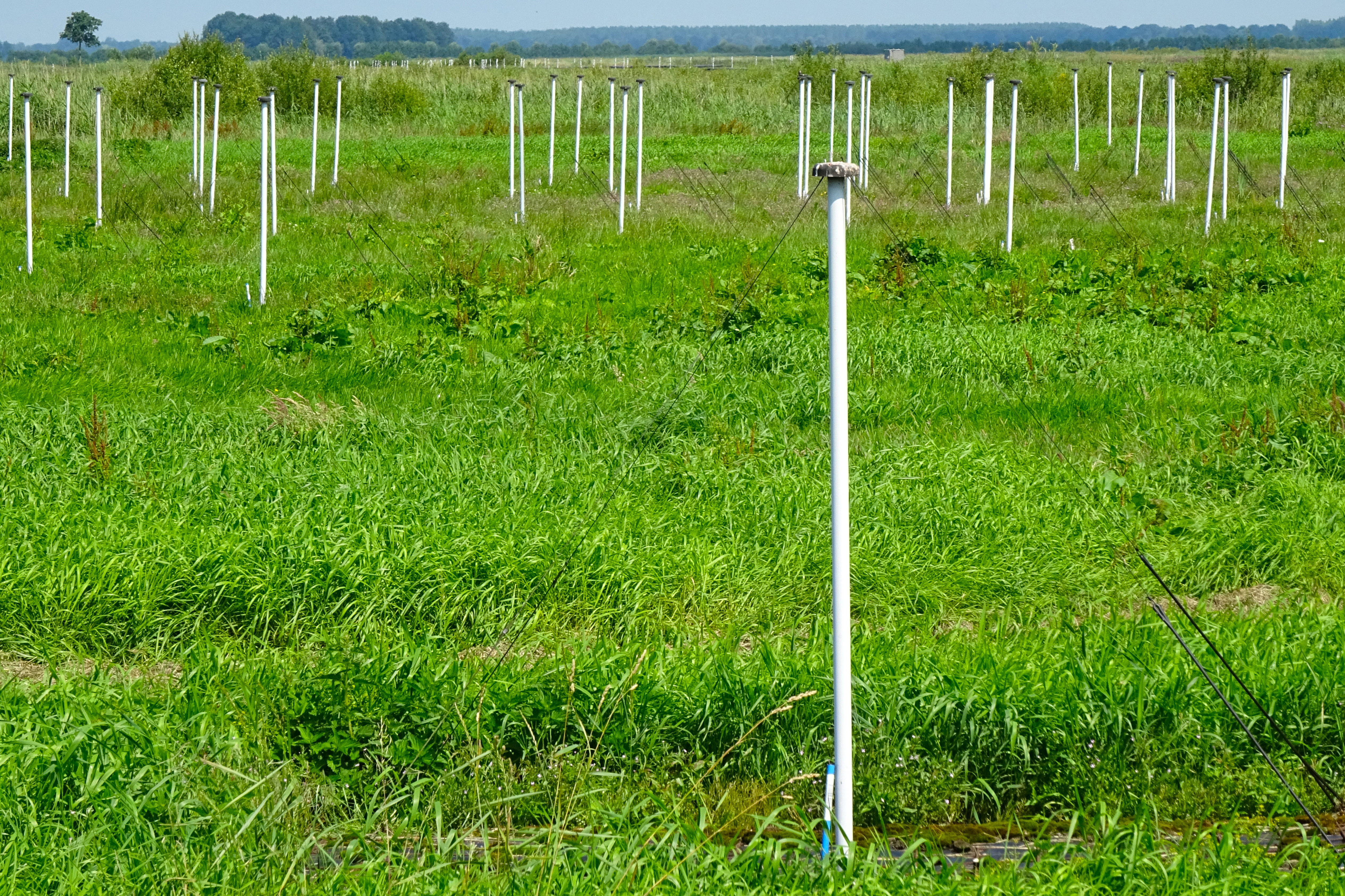 Lofar (detail) tussen Buinen en Exloo